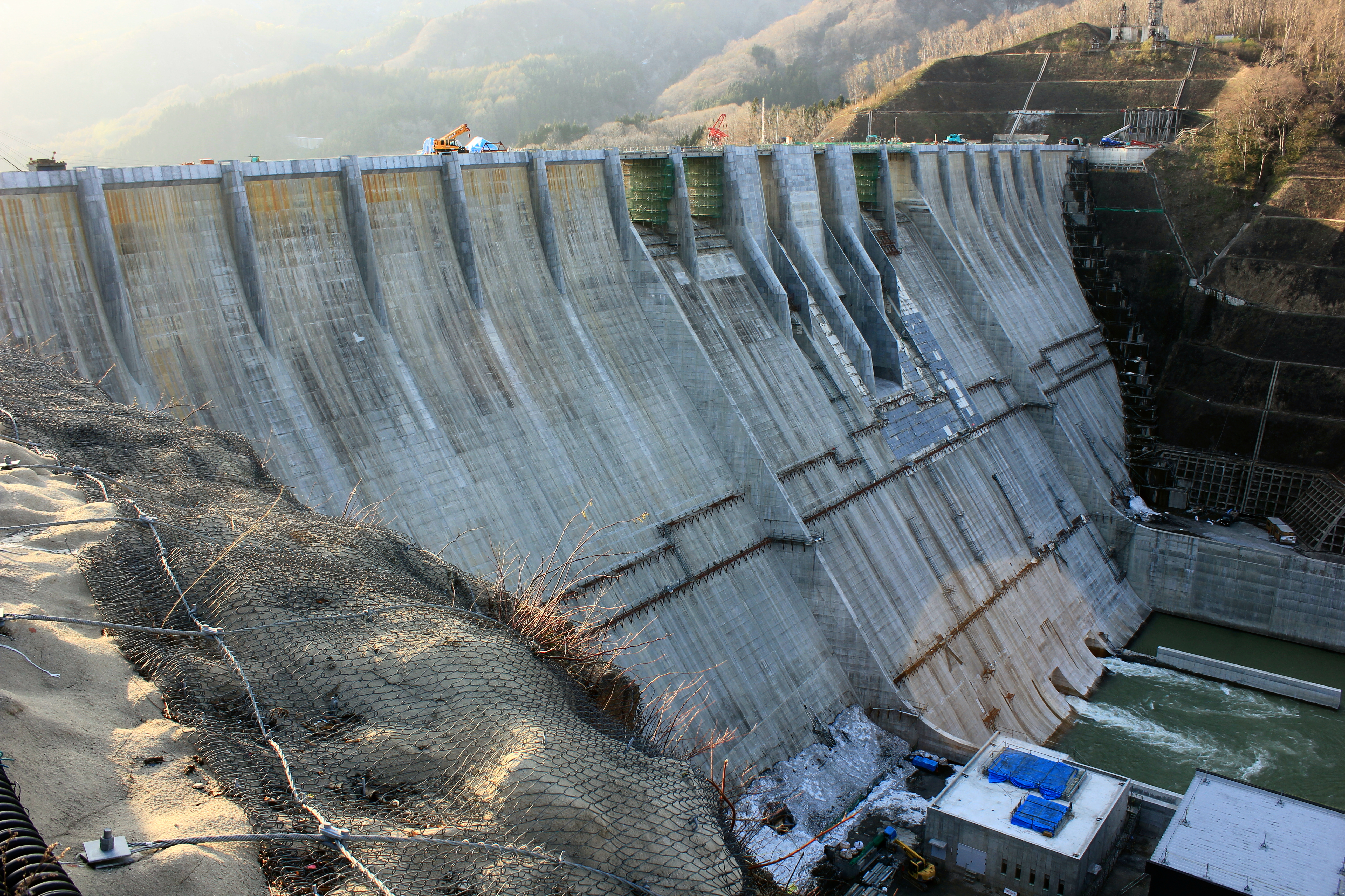 津軽ダム（青森県・岩木川。国土交通省東北地方整備局）2015年撮影